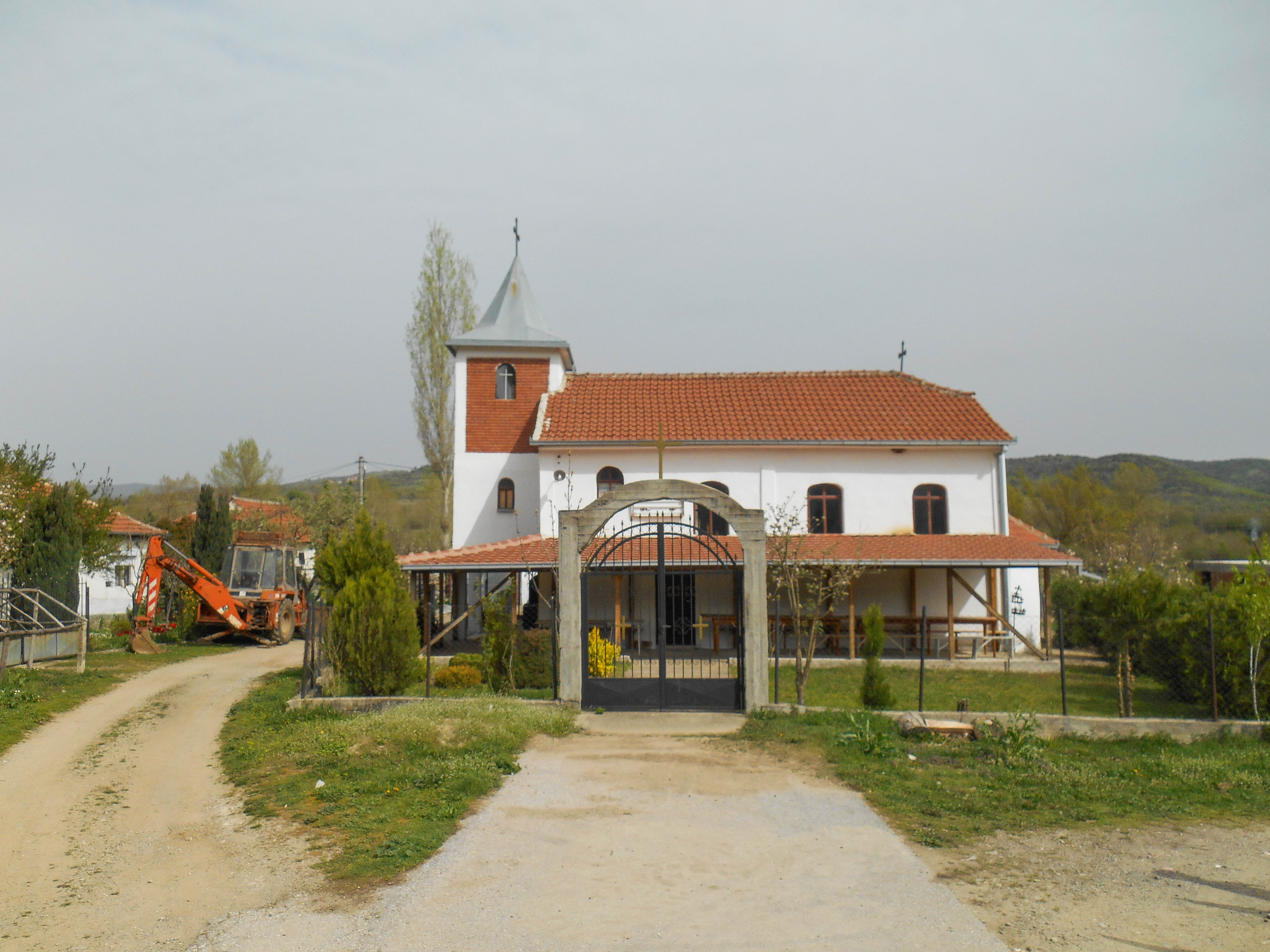 Црква Свети Кирил и Методиј